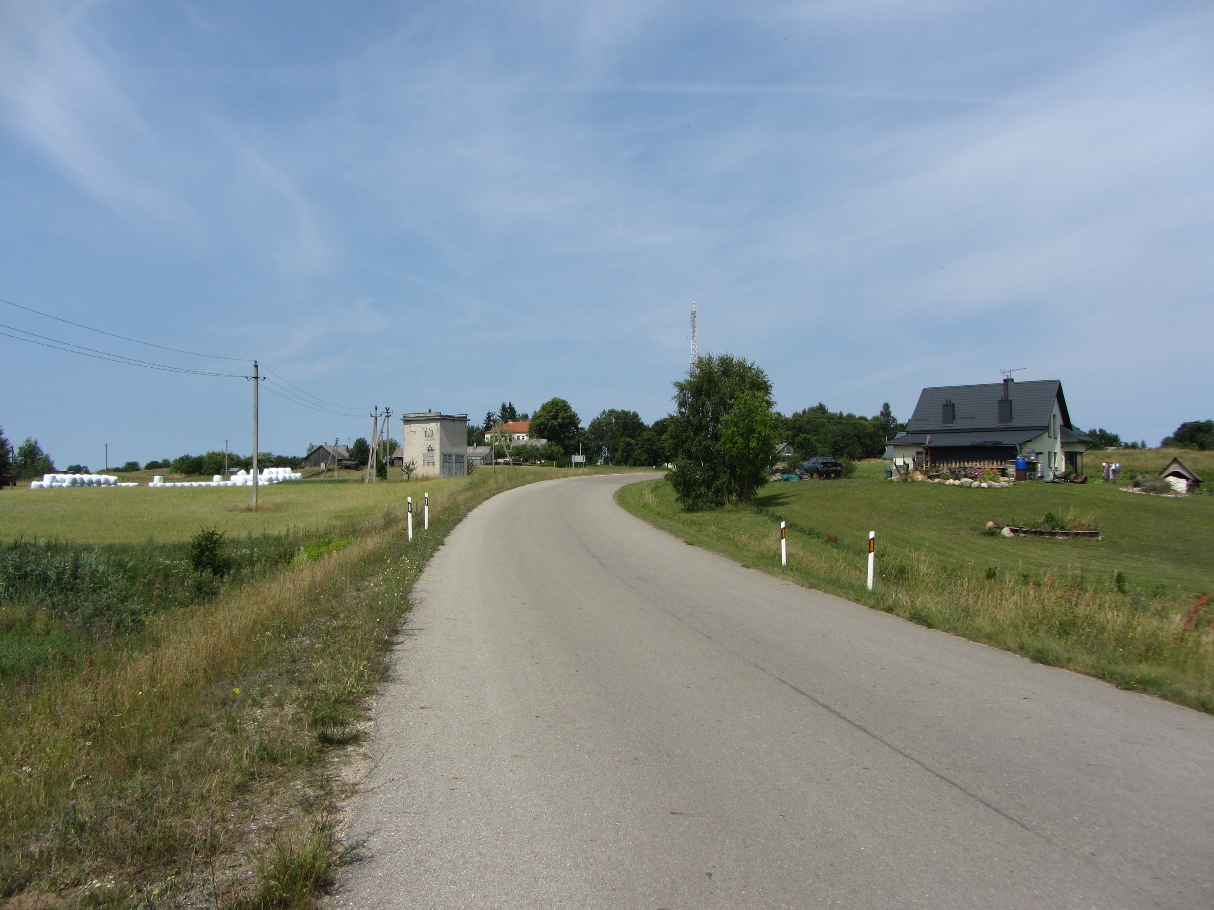 Ricieliai, Lithuania